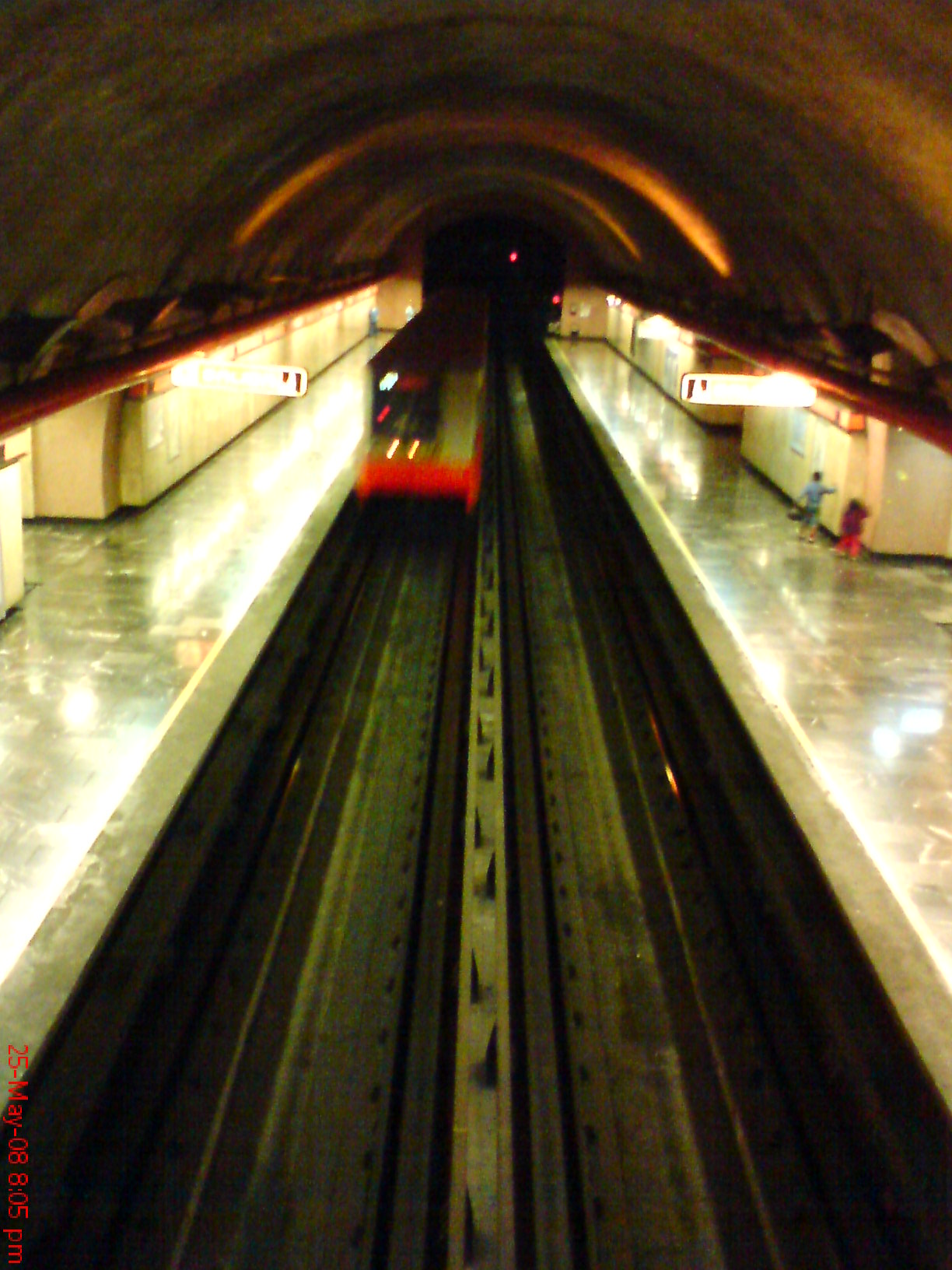 Fotografía aerea del anden del metro Camarones. Linea 7